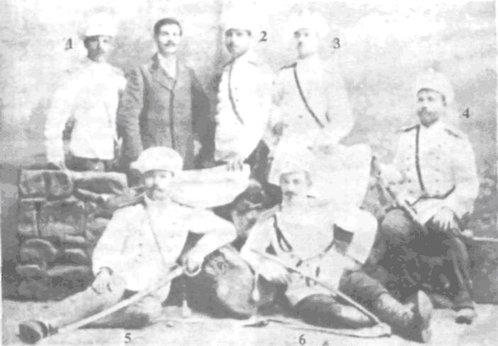 Подпоручик Йордан Венедиков (1), поручик Петър Начев (2), подпоручик Борис Сарафов (3), поручик Хараламби Луков (4), поручик Васил Мутафов (5), поручик Стойчо Гаруфалов (6).